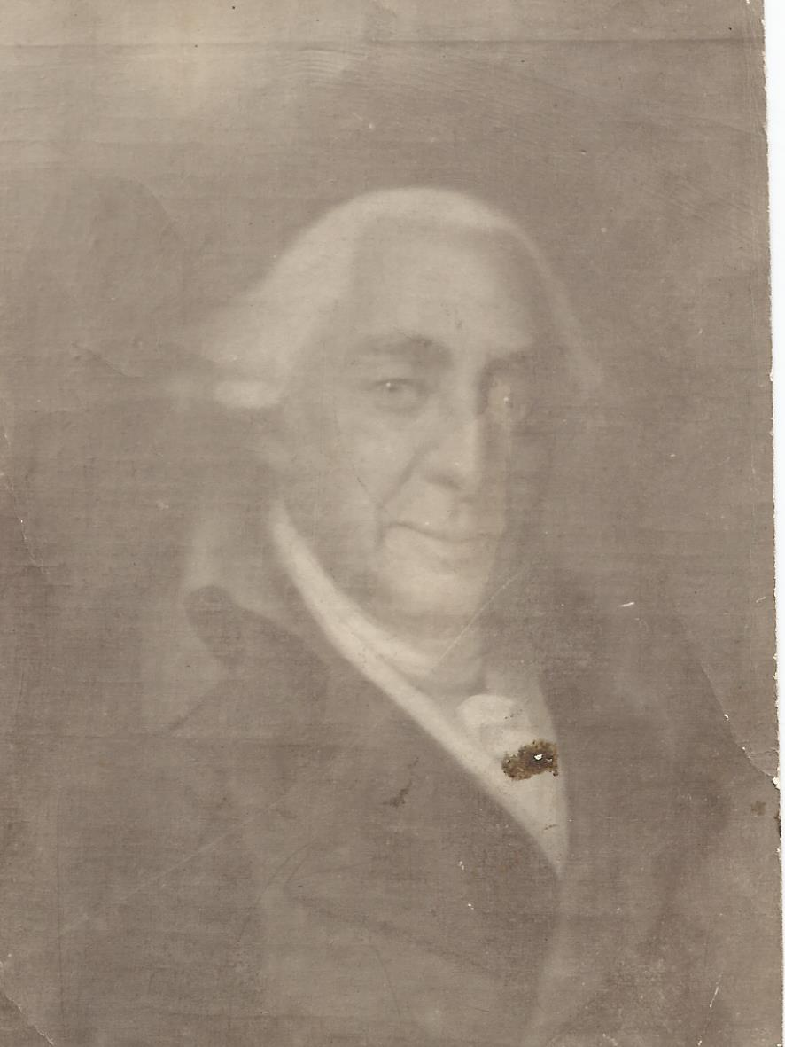 Geb. 23.08.1728 Oeltzschau, gest. 6.4.1799 Neustrelitz, Original Ölbild Neuensalz, nach 1945 verschollen. Kurf. Sächs. u. Mecklb. Kammerherr